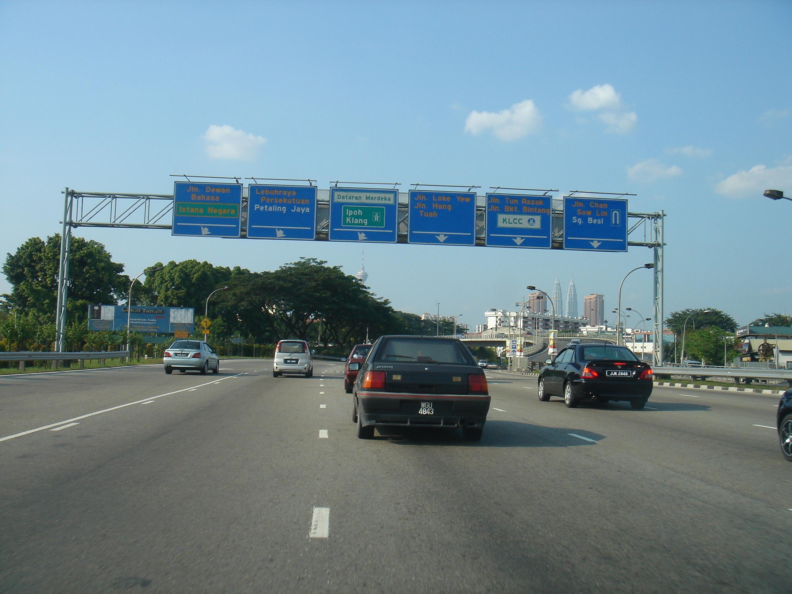 Federal Highway, Kuala Lumpur, Malaysia.